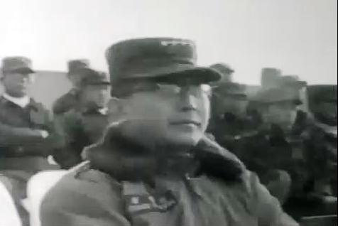 육군참모총장 정일권